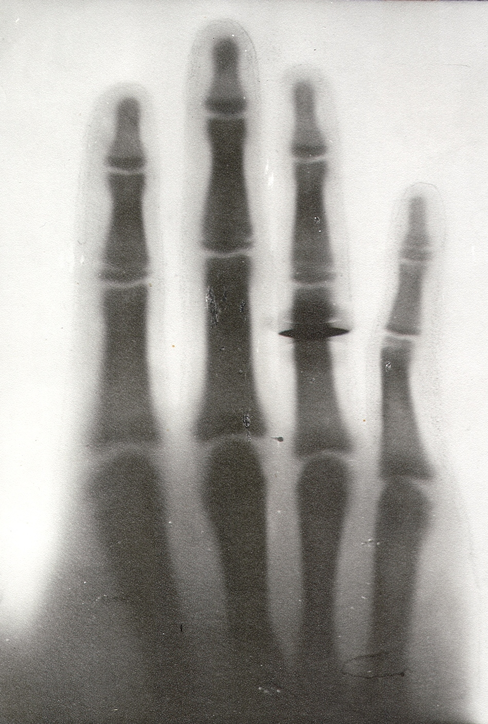 Primera radiografía tomada en América Latina, por Luis Zegers y Arturo Salazar el 22 de marzo de 1896